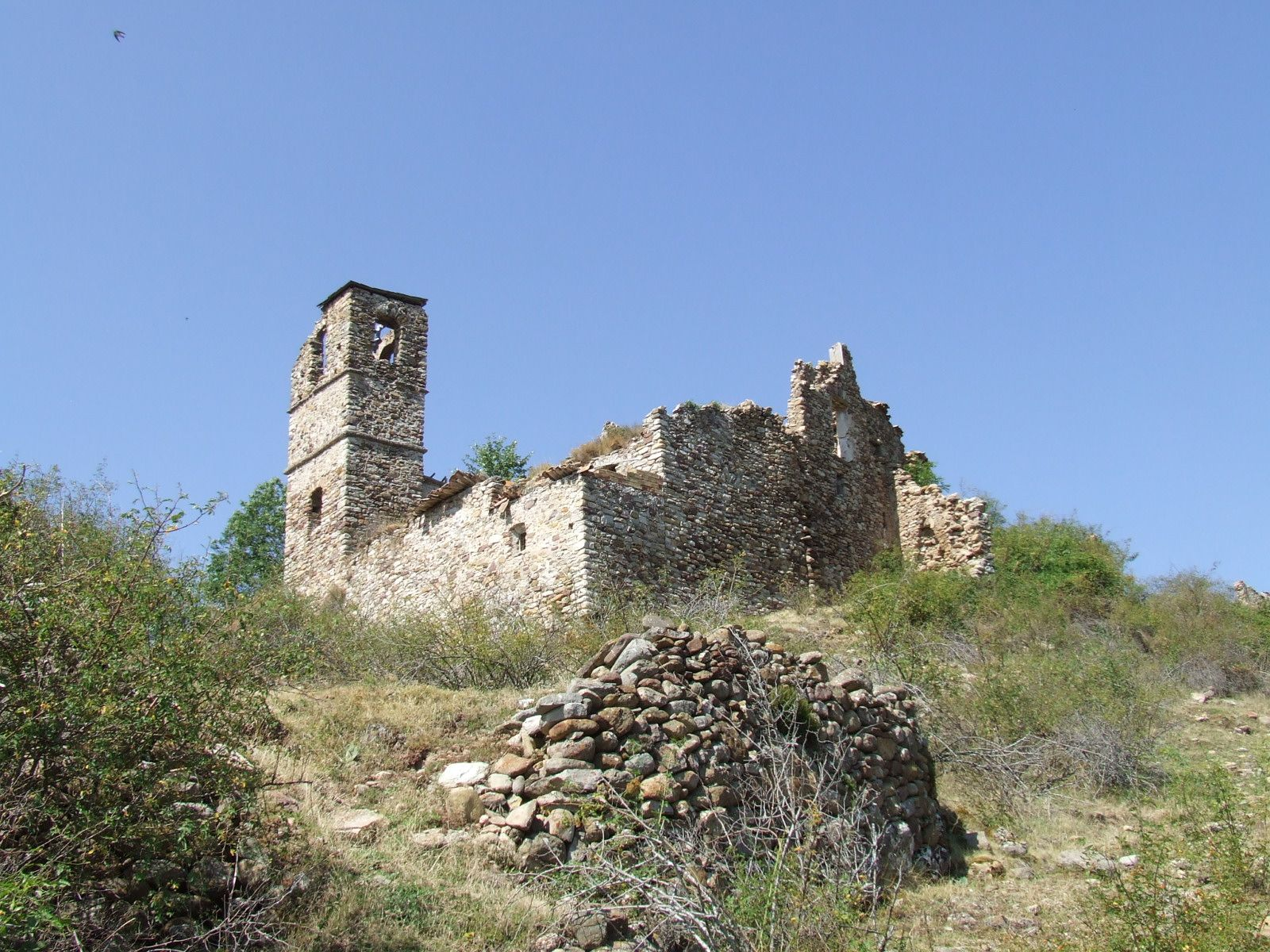 L'església de la Bastida de Bellera (Sarroca de Bellera, Pallars Jussà)